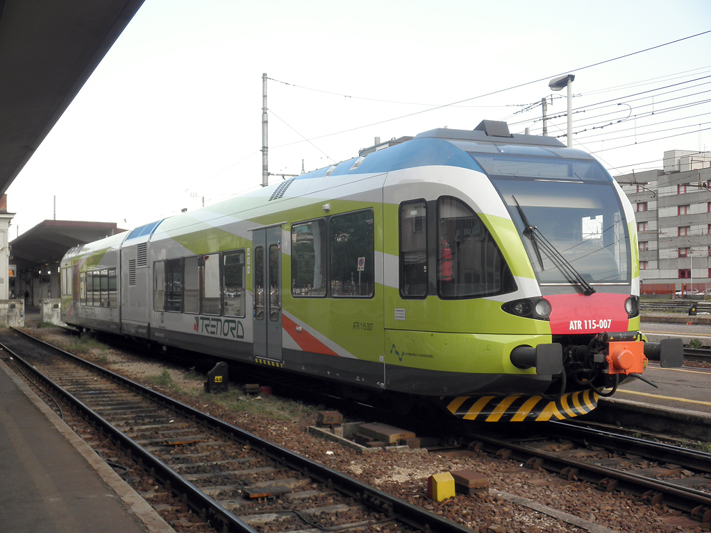 Autotreno ATR 115-007 delle Ferrovie Nord Milano in sosta a Brescia, sui binari della linea per Iseo.